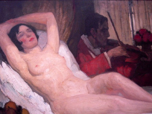 Le Délassement, huile sur bois, 74,5 × 110 cm, musée des beaux-arts de Pau[1].